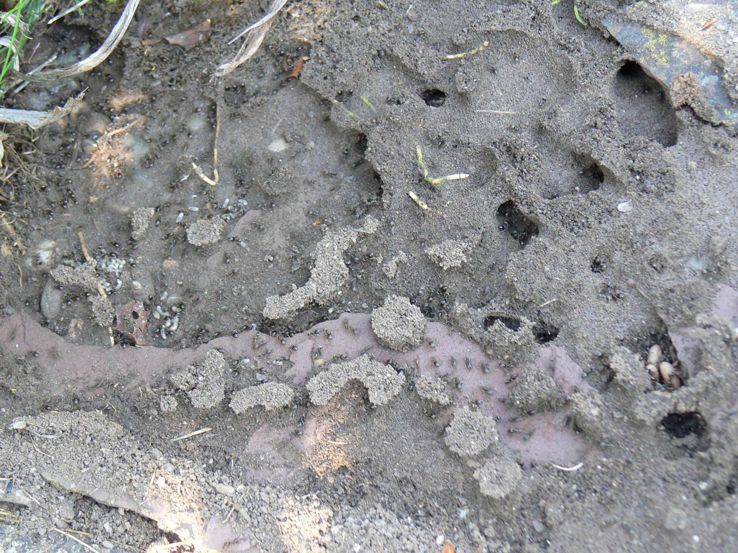 Die Gänge einer Ameisenkolonie unter einem Stein